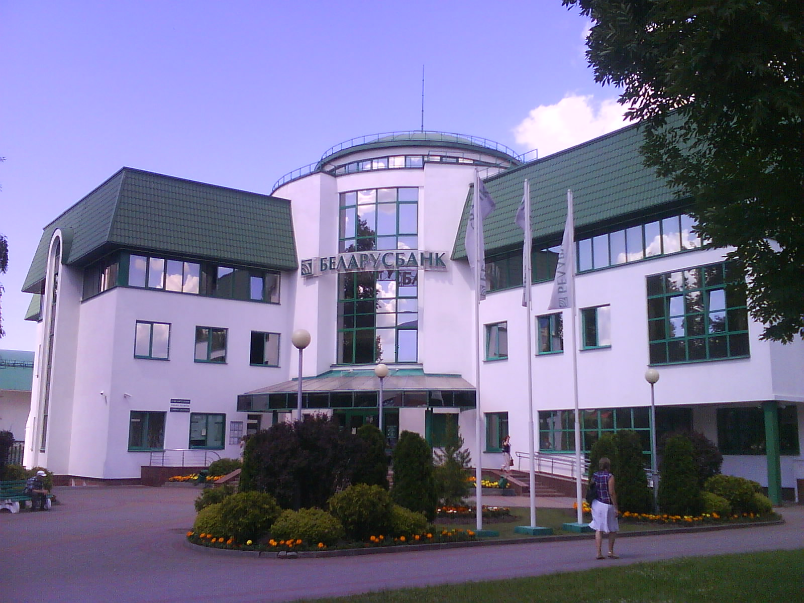 Беларусбанк